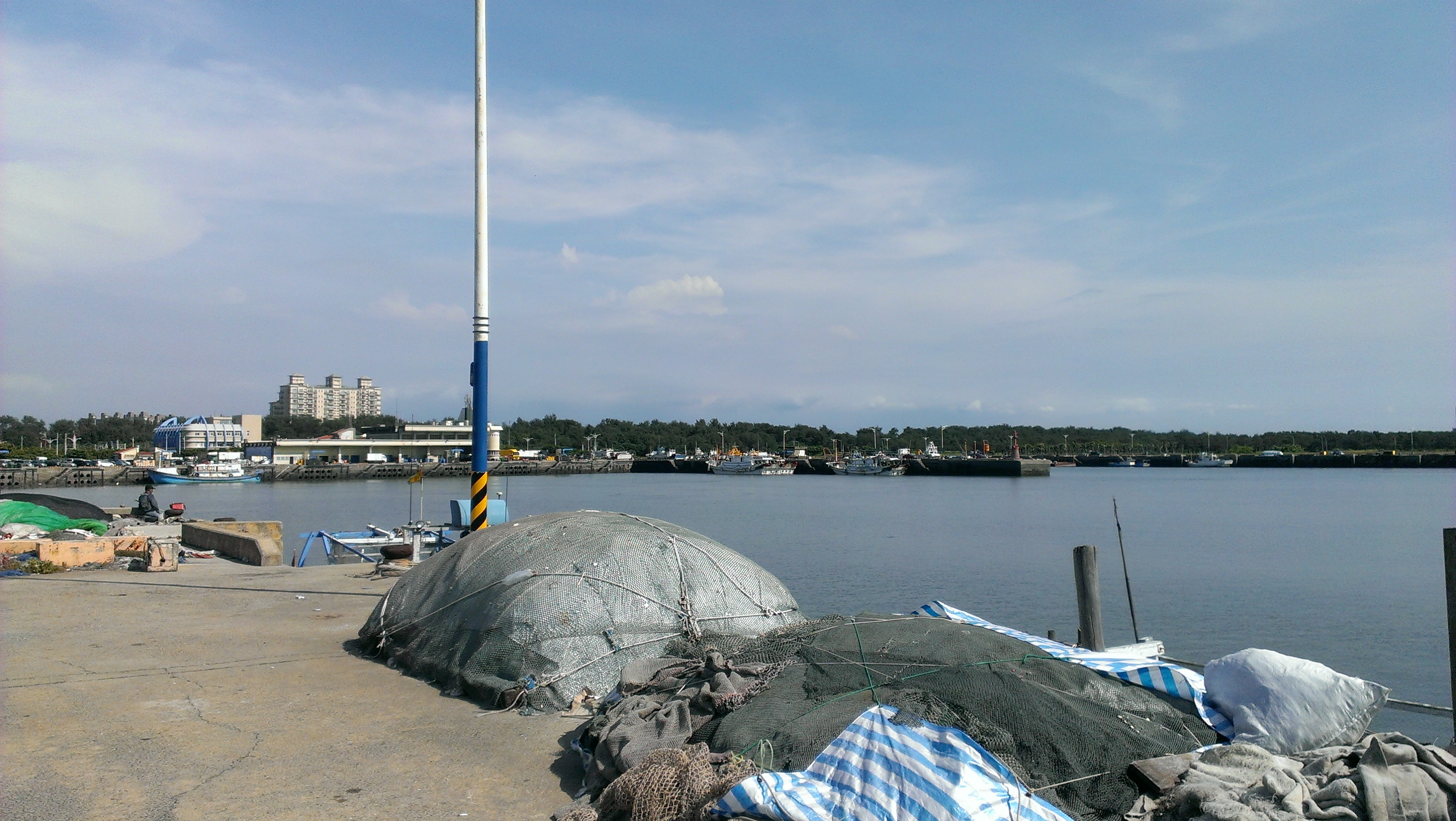 中文（台灣）: 新竹漁港港內